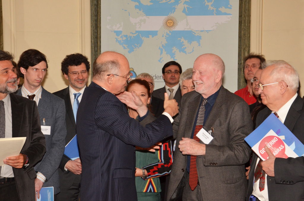 Londres Febrero 6 de 2013. Destacadas personalidades de la política y la cultura de numerosos países de Europa mantuvieron esta mañana en Londres una reunión sin precedentes con el canciller Héctor Timerman y suscribieron una Declaración convocando al diálogo entre la Argentina y el Reino Unido para resolver en forma pacífica y definitiva la disputa de soberanía por las Islas Malvinas